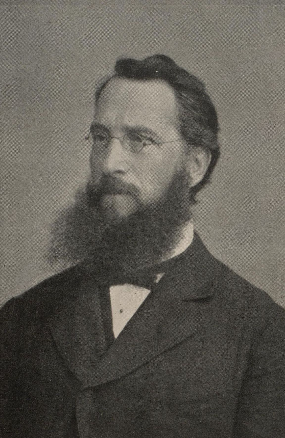 Porträtfoto von Franz Perrot